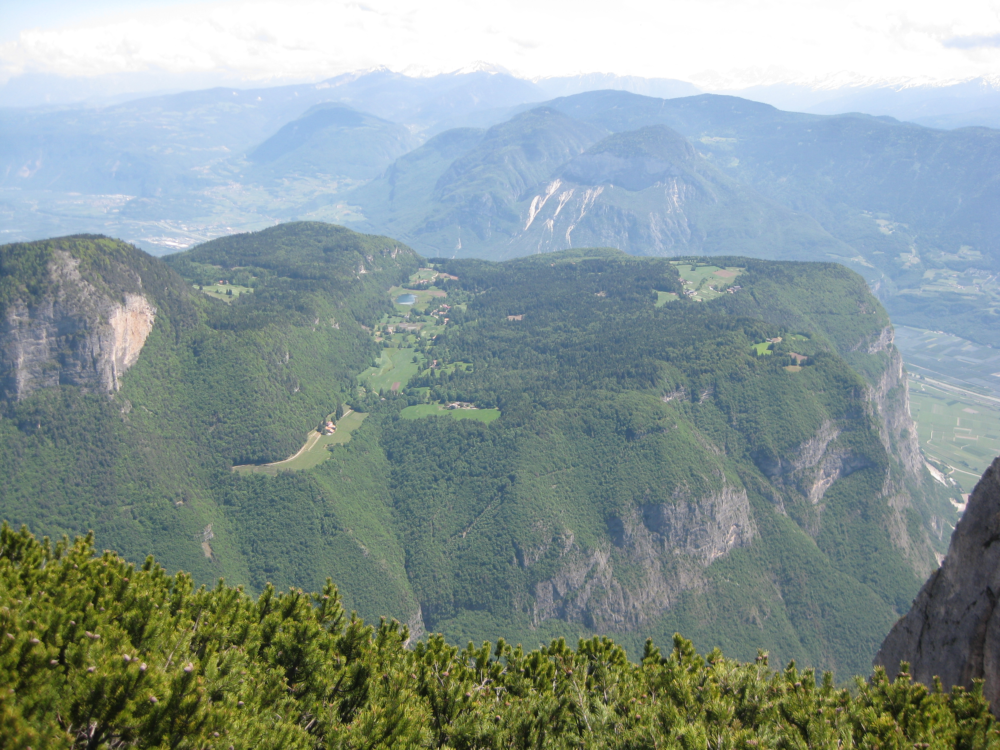 Der Fennberg von oben betrachtet, vom Gipfel der westlich gelegenen Wiggerspitze (Cima Roccapiana) aus. Das Bild zeigt unter anderem die Rappenkoflwand (die höchste Erhebung des Fennberger Plateaus), die Geländestufe zwischen Oberfennberg und Unterfennberg und den knapp unterhalb der Geländestufe liegenden Fennberger See.